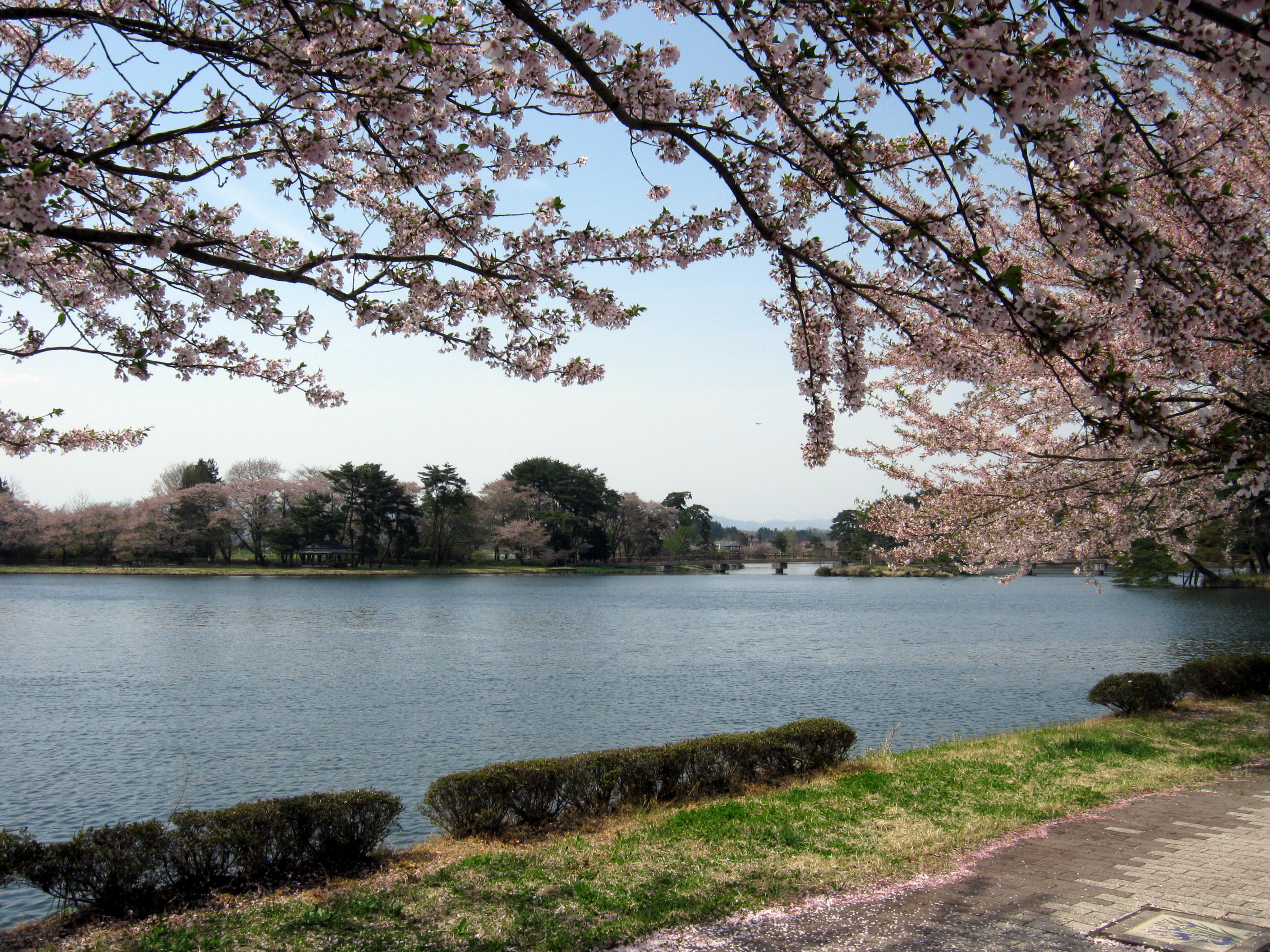 大池公園(矢吹町）